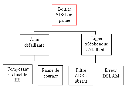 Exemple d'arbre de défaillances